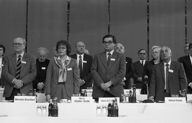 SPD-Parteitag in der Olympiahalle in München